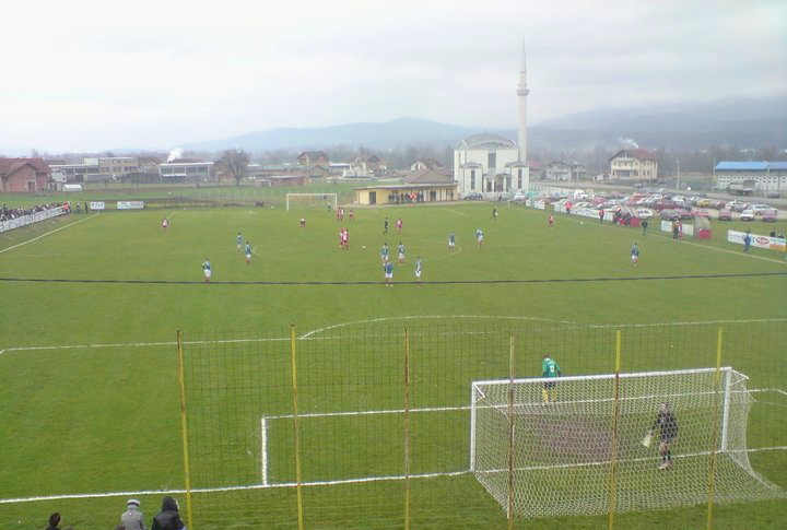 Stadion Stjepan Polje